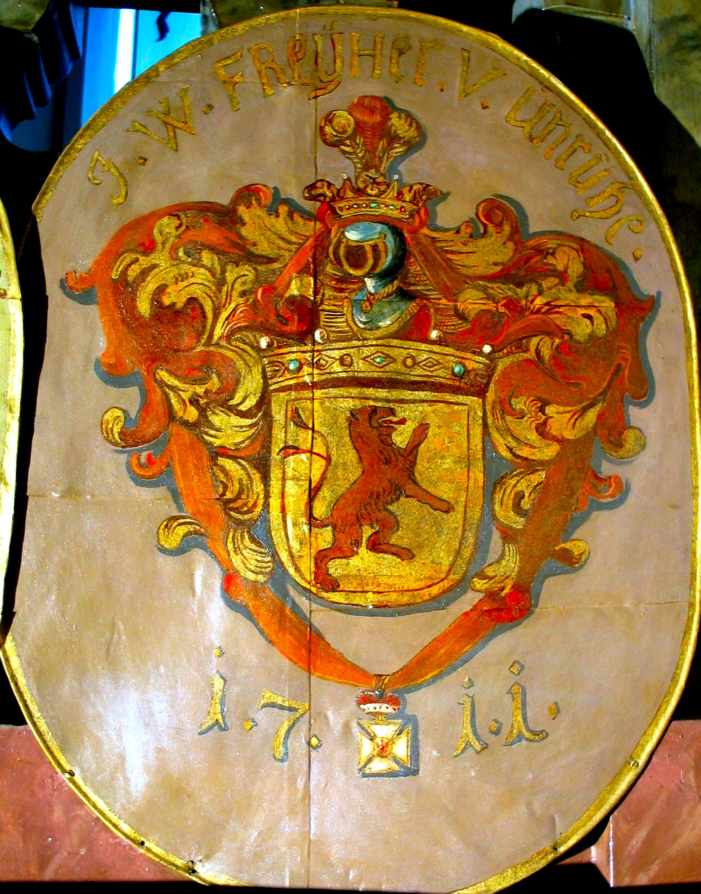 Ordensschild mit Wappen des Freiherrn Johann Wilhelm von Unruh, Text: J. W. FReYher. V. Unruhe. - 1711, er war Kaiserlicher Obrist